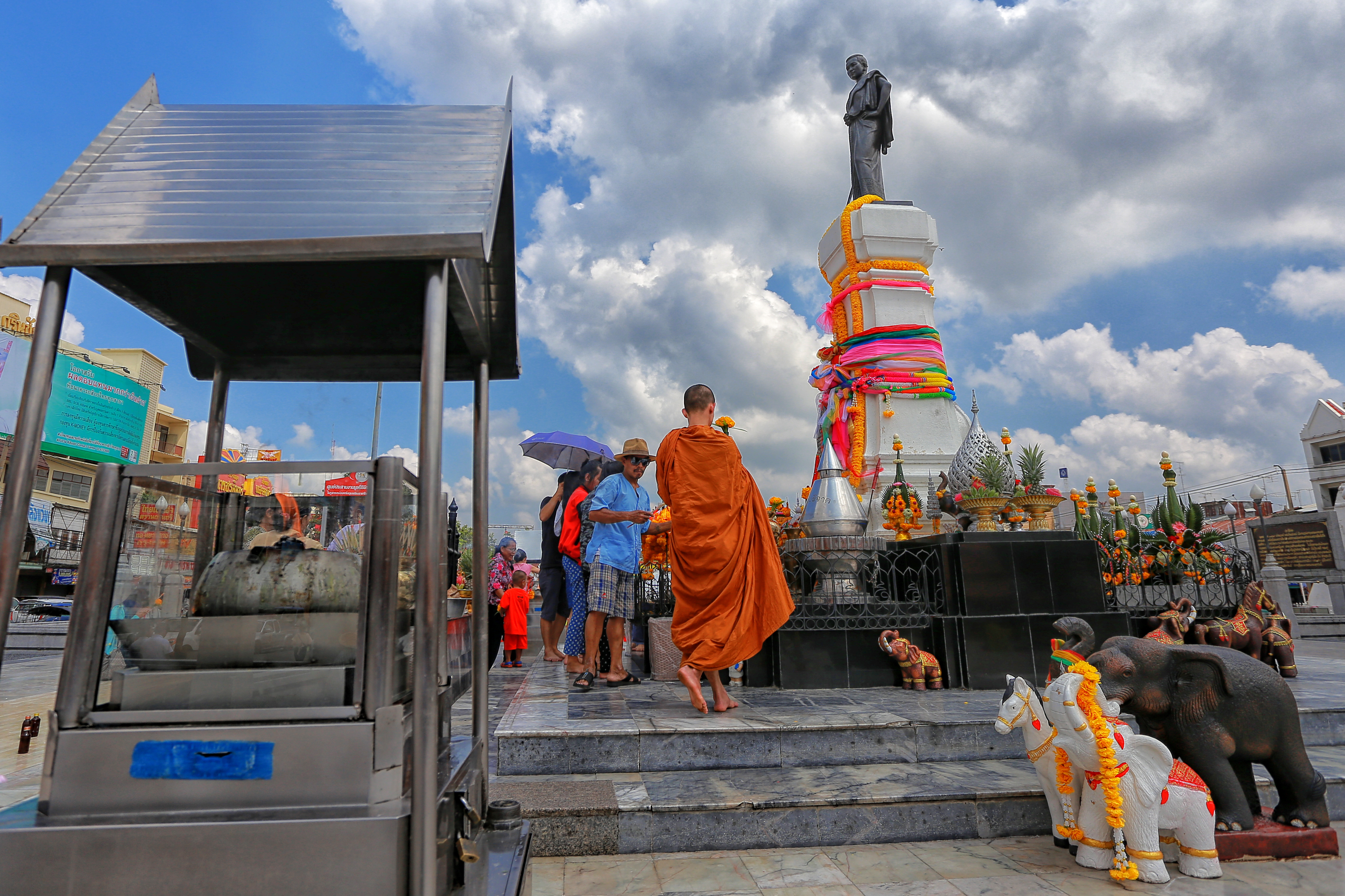 ท้าวสุรนารี, คุณหญิงโม (ต้นฉบับว่า คุณหญิงโม้) หรือ ย่าโม (พ.ศ. 2314 — พ.ศ. 2395) บุคคลในประวัติศาสตร์ไทย ในฐานะวีรสตรีผู้มีส่วนกอบกู้เมืองนครราชสีมาจากกองทัพเจ้าอนุวงศ์ พระมหากษัตริย์เวียงจันทน์ เมื่อปี พ.ศ. 2369 ท้าวสุรนารี มีนามเดิมว่า "โม" (แปลว่า ใหญ่มาก) หรือ ท้าวมะโหโรง เป็นชาวเมืองนครราชสีมาโดยกำเนิด เกิดเมื่อปีระกา พ.ศ. 2314 มีนิวาสถานอยู่ ณ บ้านตรงกันข้ามกับวัดพระนารายณ์มหาราช (วัดกลางนคร) ทางทิศใต้ของเมืองนครราชสีมา[1] เป็นธิดาของนายกิ่มและนางบุญมา มีพี่สาวหนึ่งคนชื่อ แป้นาผล ไม่มีสามี จึงอยู่ด้วยกันจนวายชนม์ มีน้องชายหนึ่งคน ชื่อ จุก (ภายหลังได้เป็นเจ้าเมืองพนมซร็อก ต่อมามีการอพยพชาวเมืองพนมซร็อกมาอยู่ริมคูเมืองนครราชสีมาด้านใต้ จึงเอาชื่อเมืองพนมซร็อกมาตั้งชื่อ บ้านพนมศรก ต่อมาเรียกเพี้ยนเป็นบ้านสก อยู่หลังสถานีรถไฟชุมทางถนนจิระจนทุกวันนี้) [1] เมื่อปี พ.ศ. 2339 โม เมื่ออายุได้ 25 ปี ได้แต่งงานสมรสกับนายทองคำขาว พนักงานกรมการเมืองนครราชสีมา ต่อมานายทองคำขาว ได้เลื่อนบรรดาศักดิ์เป็น "พระภักดีสุริยเดช" ตำแหน่งรองปลัดเมืองนครราชสีมา นางโม จึงได้เป็น คุณนายโม และต่อมา "พระภักดีสุริยเดช" ได้เลื่อนเป็น "พระยาสุริยเดช" ตำแหน่งปลัดเมืองนครราชสีมา คุณนายโมจึงได้เป็น คุณหญิงโม [1] ชาวเมืองนครราชสีมาเรียกท่านทั้งสองเป็นสามัญว่า "คุณหญิงโม" และ "พระยาปลัดทองคำ" ท่านเป็นหมันไม่มีทายาทสืบสายโลหิต ชาวเมืองนครราชสีมาทั้งหลายจึงพากันเรียกแทนตัวคุณหญิงโมว่า แม่ มีผู้มาฝากตัวเป็นลูก-หลานกับคุณหญิงโมอยู่มาก ซึ่งเป็นกำลังและอำนาจส่งเสริมคุณหญิงโมให้ทำการใด ๆ ได้สำเร็จเสมอ หนึ่งในลูกหลานคนสำคัญที่มีส่วนร่วมกับคุณหญิงโม เข้ากอบกู้เมืองนครราชสีมาจากกองทัพเจ้าอนุวงศ์ เวียงจันทน์ ณ ทุ่งสัมฤทธิ์ คือ นางสาวบุญเหลือ[1] ท้าวสุรนารีเป็นคนมีสติปัญญาหลักแหลม เล่นหมากรุกเก่ง มีความชำนาญในการขี่ช้าง ขี่ม้า มีม้าตัวโปรดสีดำ และมักจะพาลูกหลานไปทำบุญที่วัดสระแก้วเป็นประจำเสมอ[1]ท้าวสุรนารี ถึงแก่อสัญกรรมเมื่อเดือน เมษายน พ.ศ. 2395 (เดือน 5 ปีชวด จัตวาศก จศ. 1214) สิริรวมอายุได้ 81 ปี